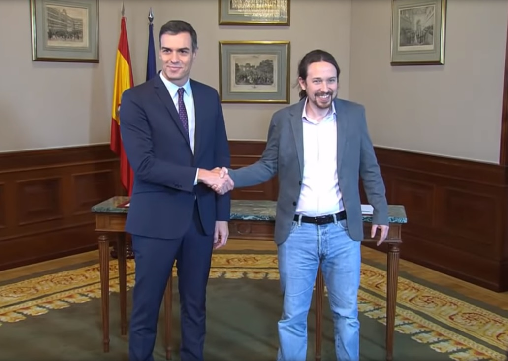 Declaración conjunta de Pablo Iglesias y Pedro Sánchez